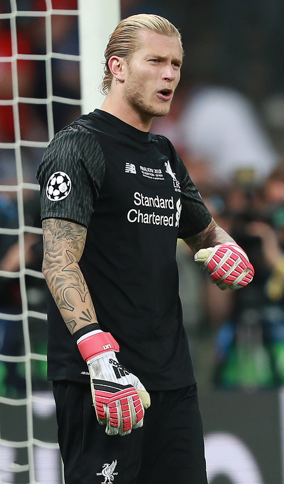 Финал ЛЧ в Киеве: 13-й кубок «Реала» и слёзы «Ливерпуля»